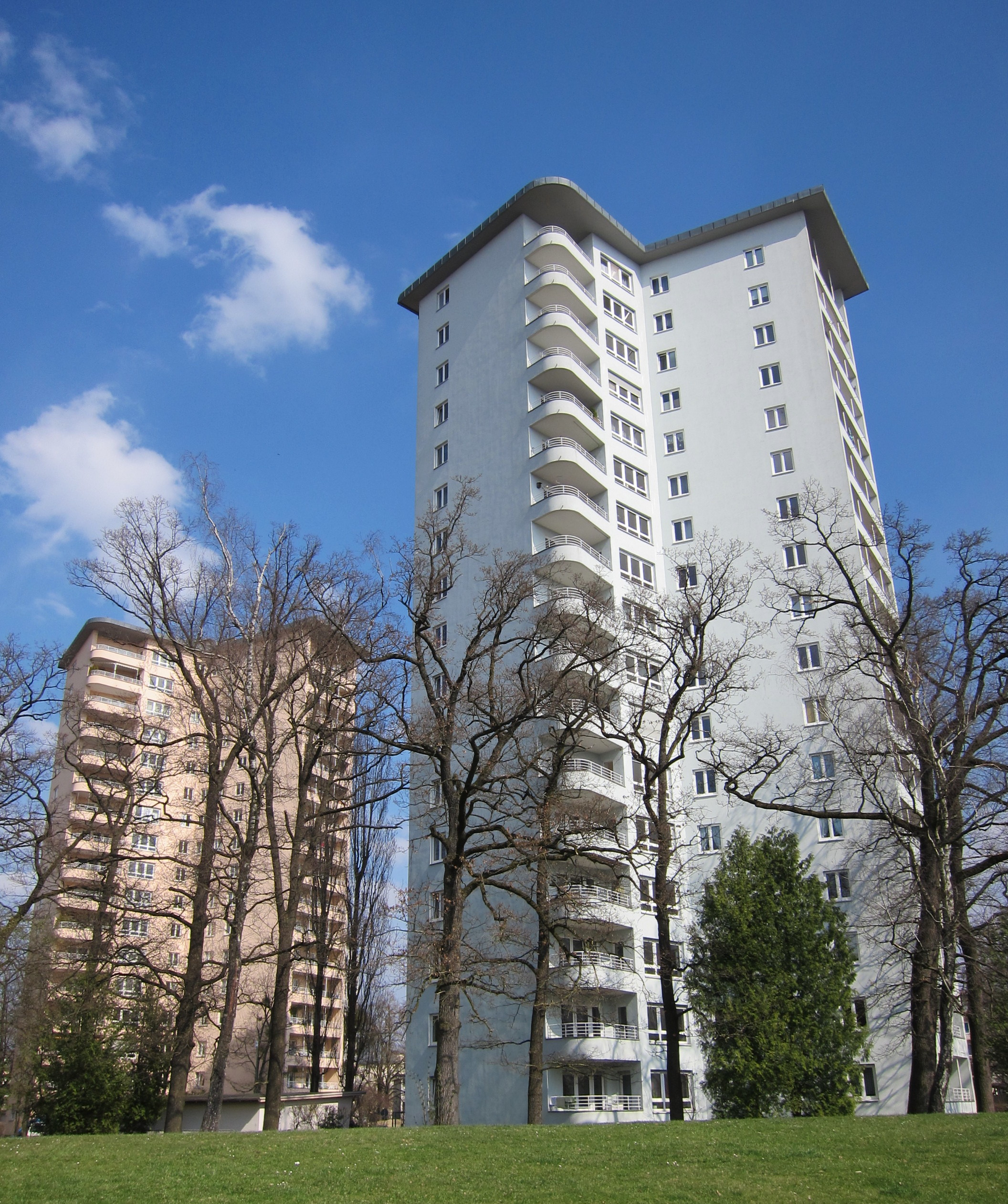 Schuckertstraße 13; Sternhaus II vorn. Schuckertstr. 14; Sternhaus I hinten.